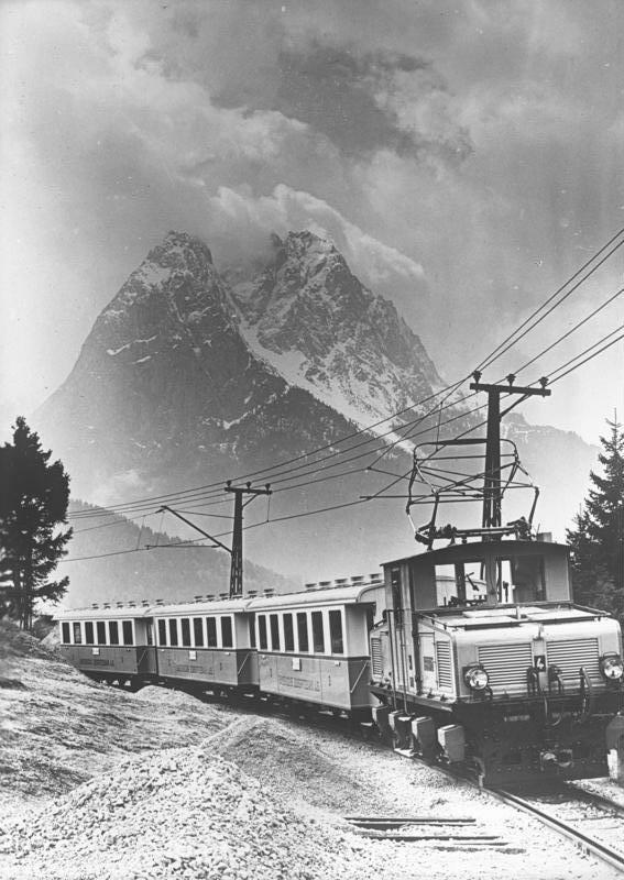 Mit Deutschlands schönster Bergbahn auf die Zugspitze. Blick auf die Zugspitzbahn auf dem Wege nach Grainau. Im Hintergrund Land der Berge.